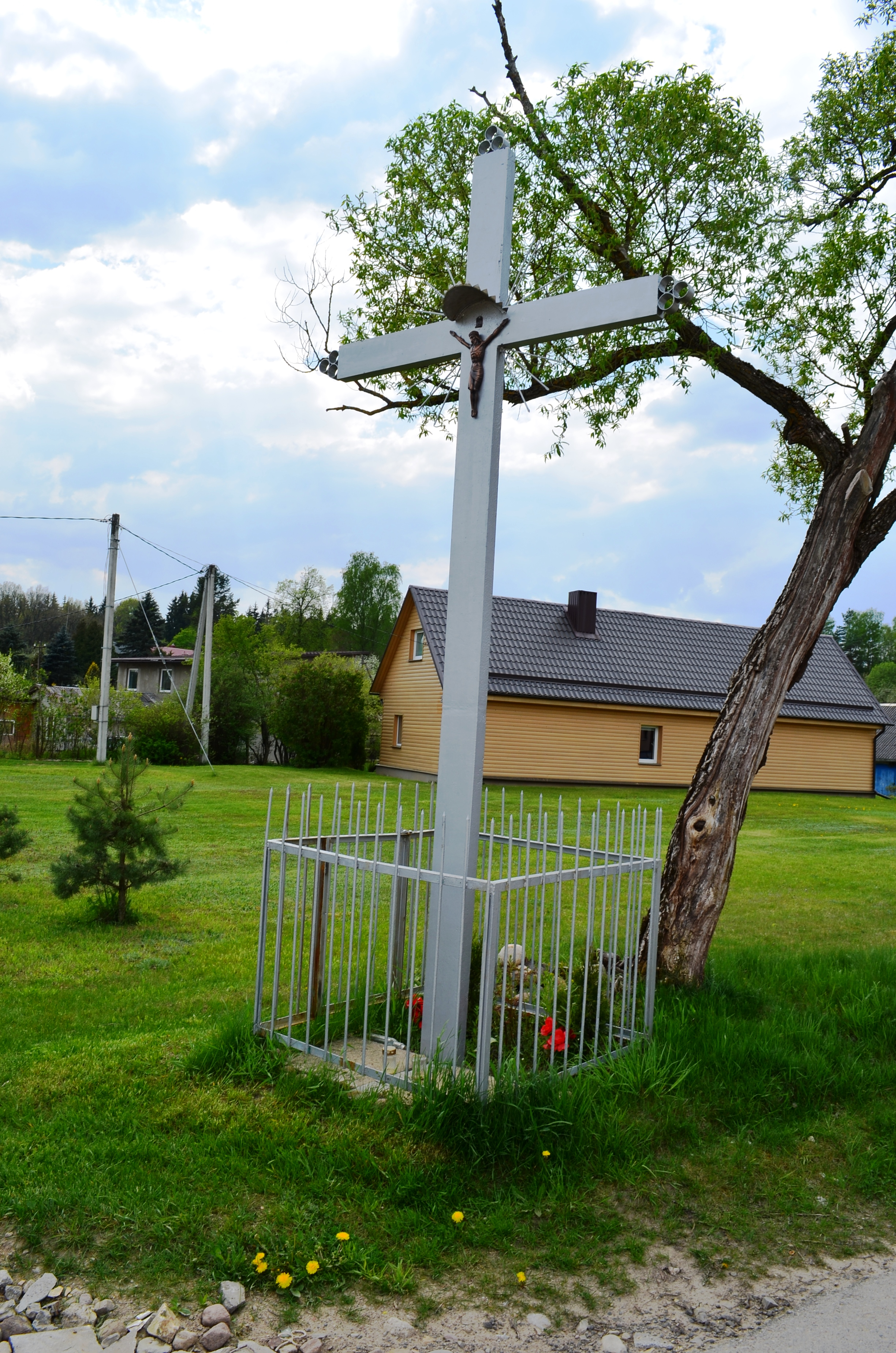 Kryžius, Gulbinėliai, Vilnius